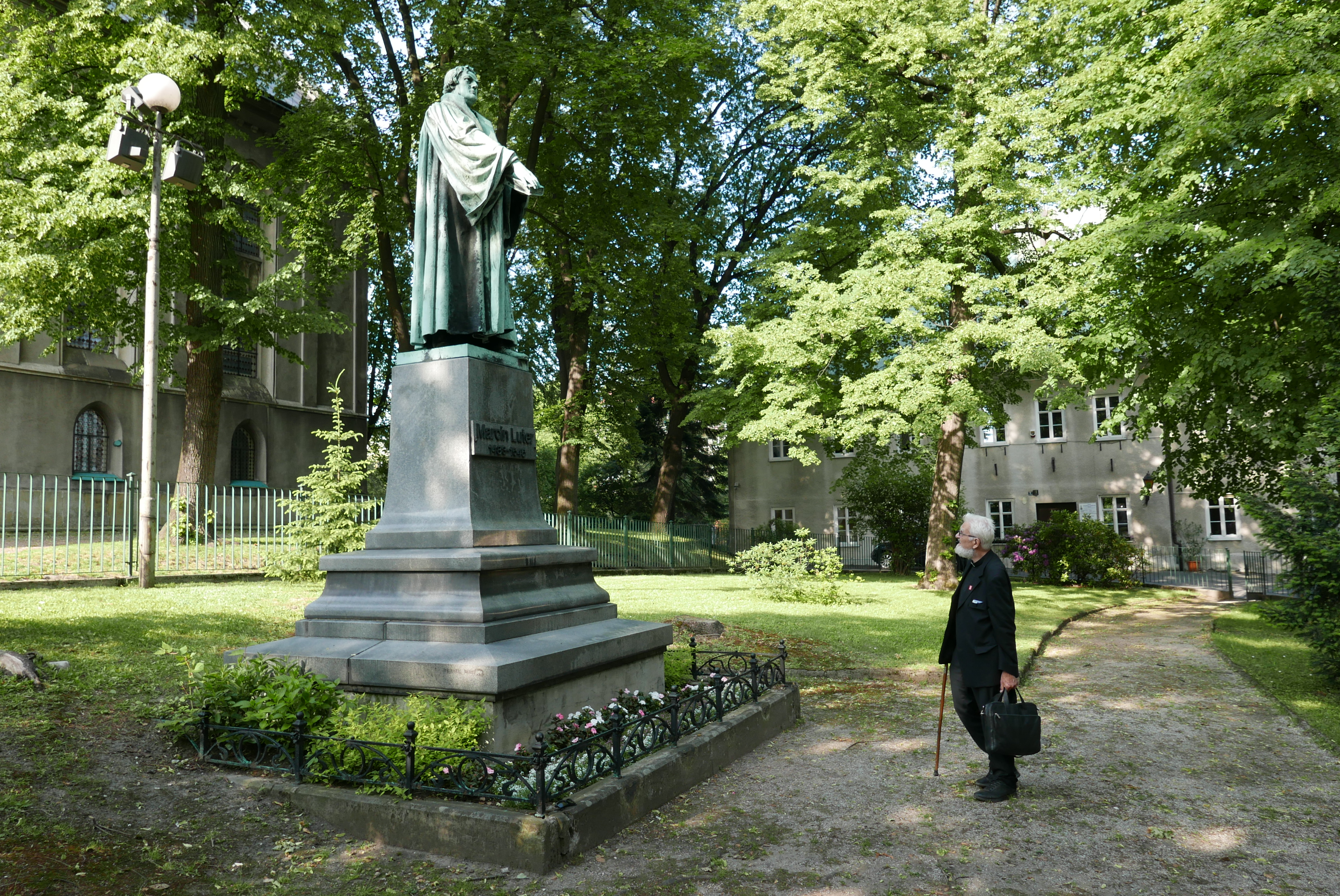 ks. Adam Boniecki obok pomnika Marcina Lutra w Bielsku-Białej